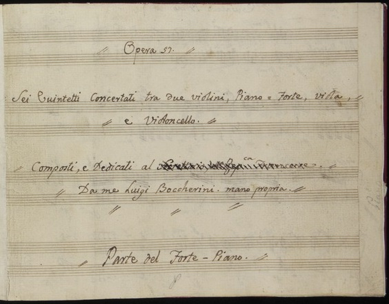 Luigi Boccherini, autographe des six quintettes pour pianoforte et cordes, op.57 (1799).